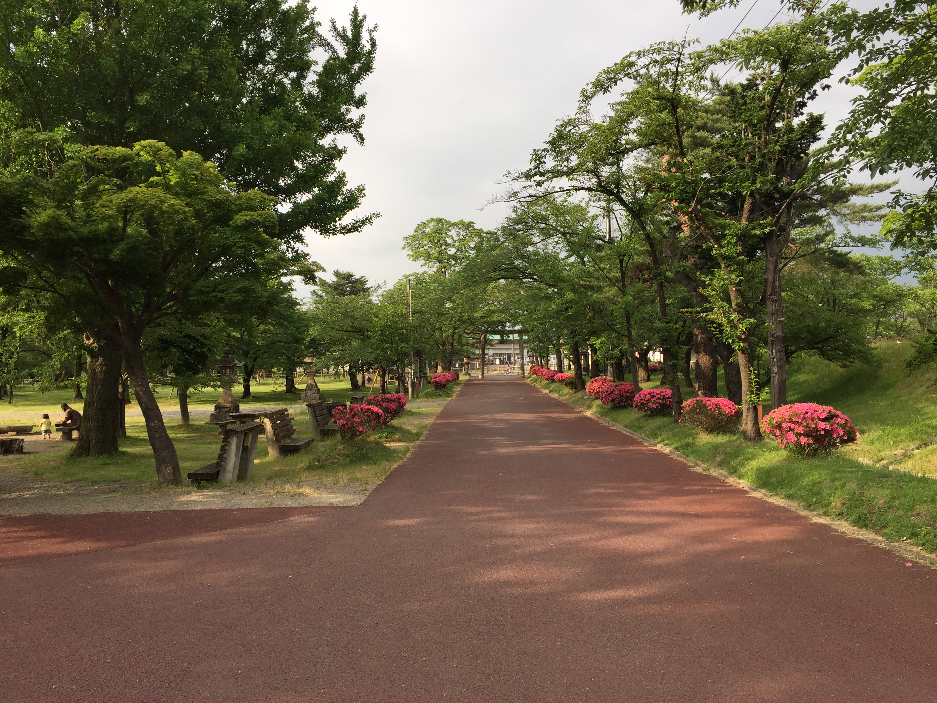 新潟市五泉市にある村松公園。